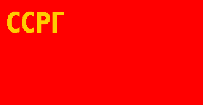 Флаг Грузинской ССР по 1922 г.